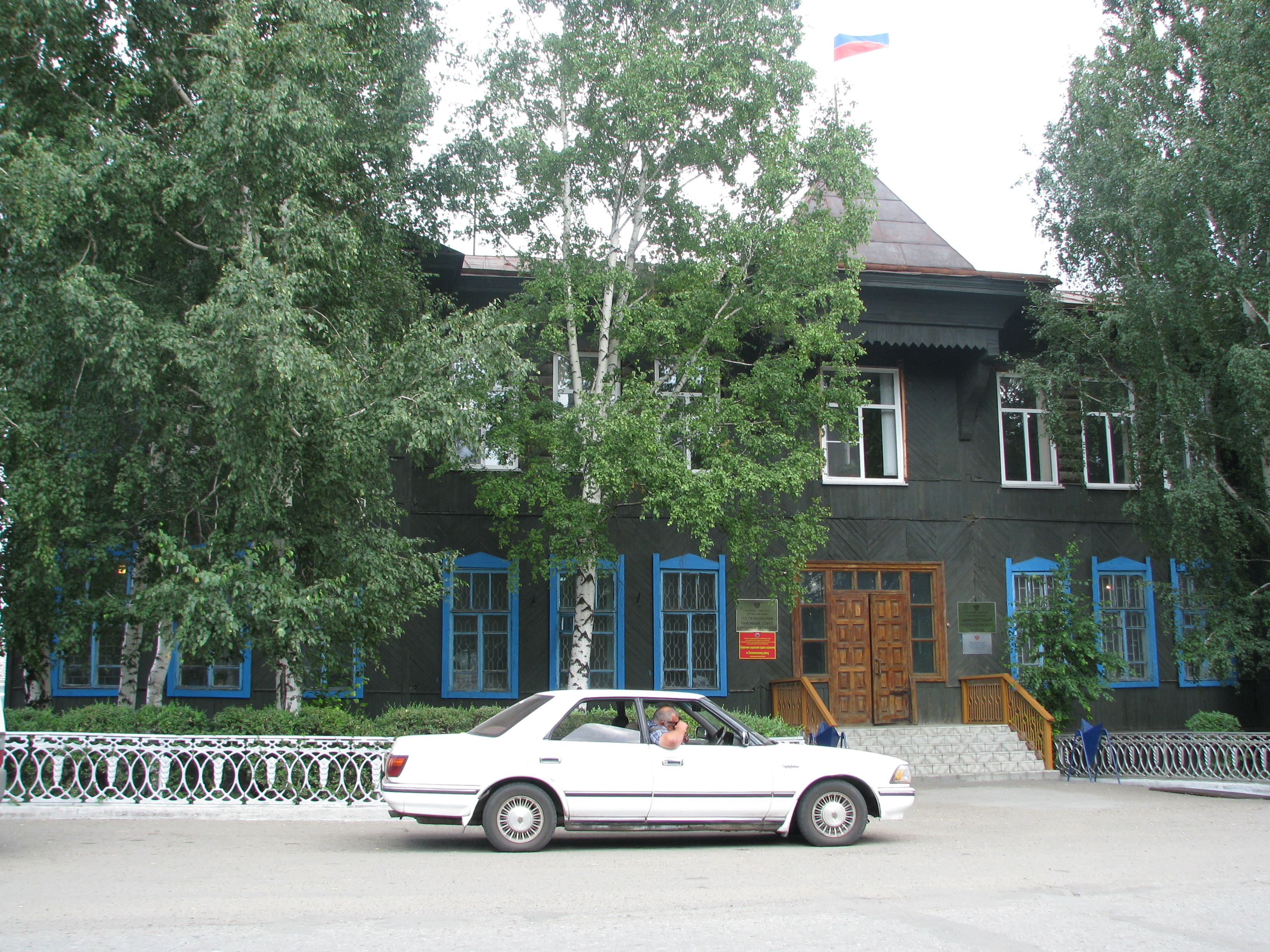 Здание администрации Поспелихинского района Алтайского края